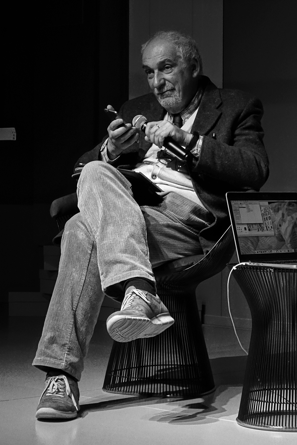 Michele Smargiassi